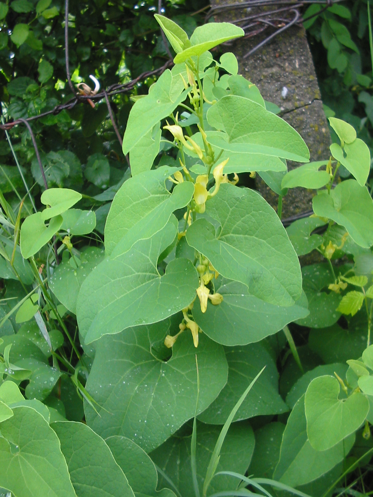 Species Aristolochia clematitis Familia Aristolochiaceae